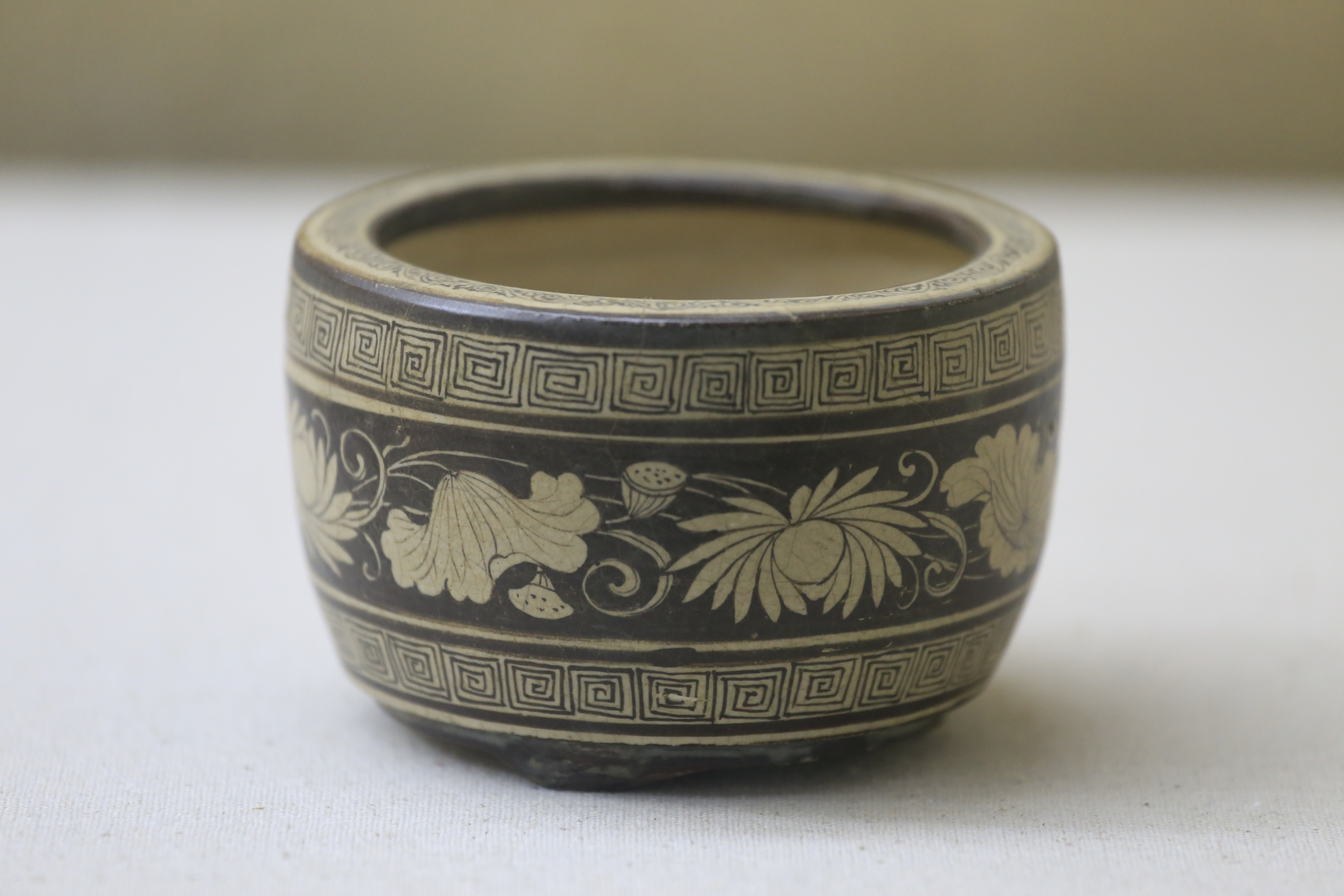 江西省博物馆—— 雅俗天成（吉州窑珍品展）——釉下褐彩莲荷纹三足炉，南宋，1970年南昌县罗家集南宋嘉定二年陈氏墓出土